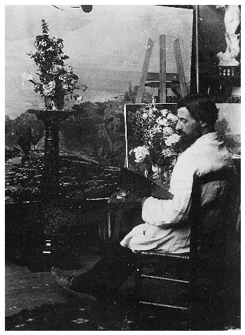 Le peintre français Jules Flour (1864-1921) dans son atelier.